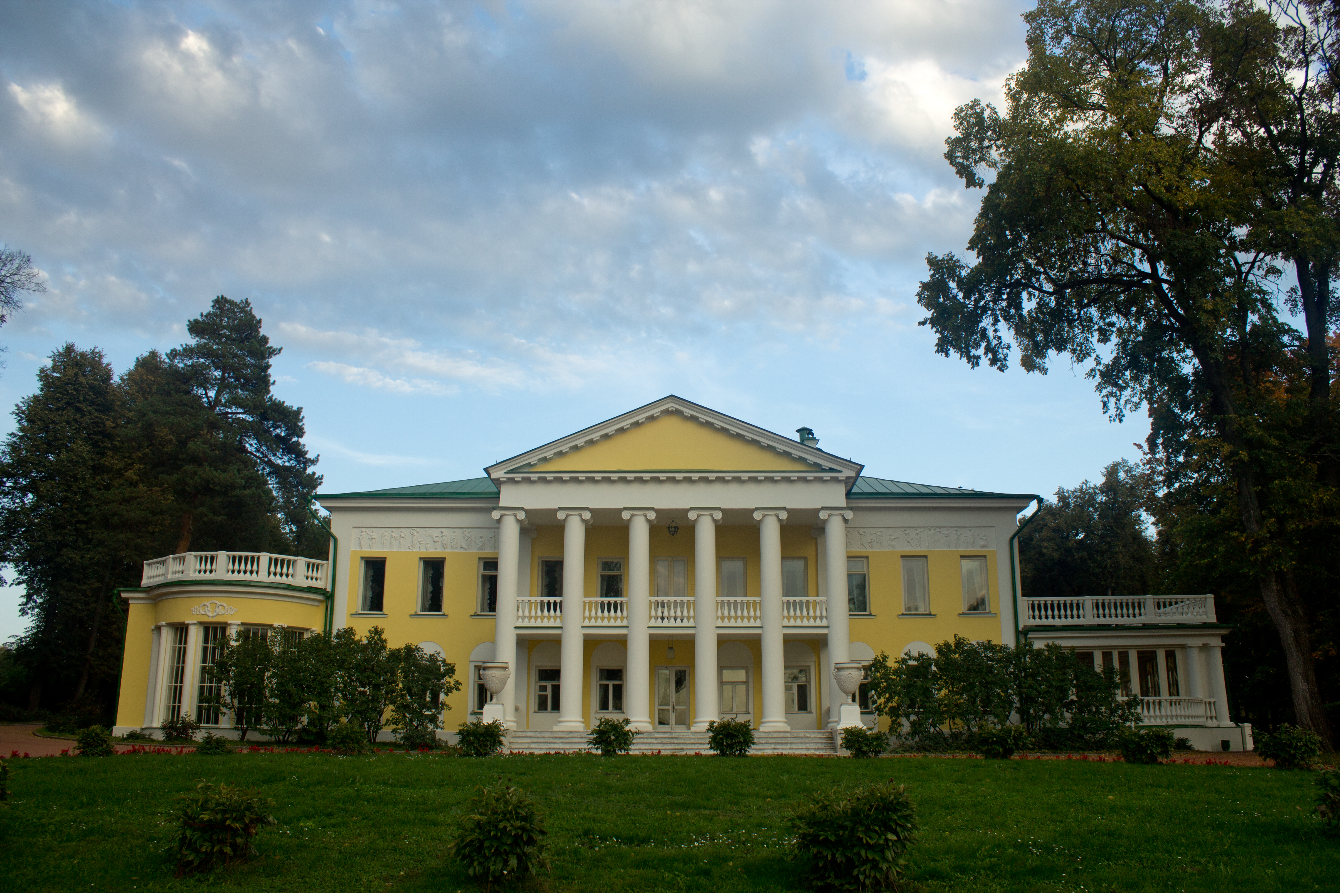 Главный дом: Горки Ленинские, Ленинский район, Московская область